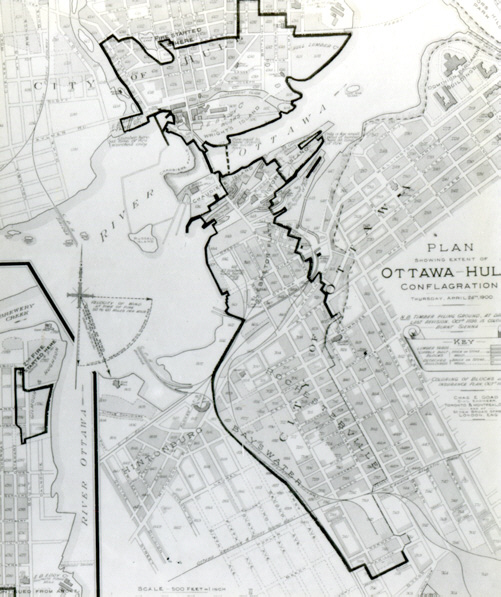 Plan des villes illustrant l'étendue des dommages.